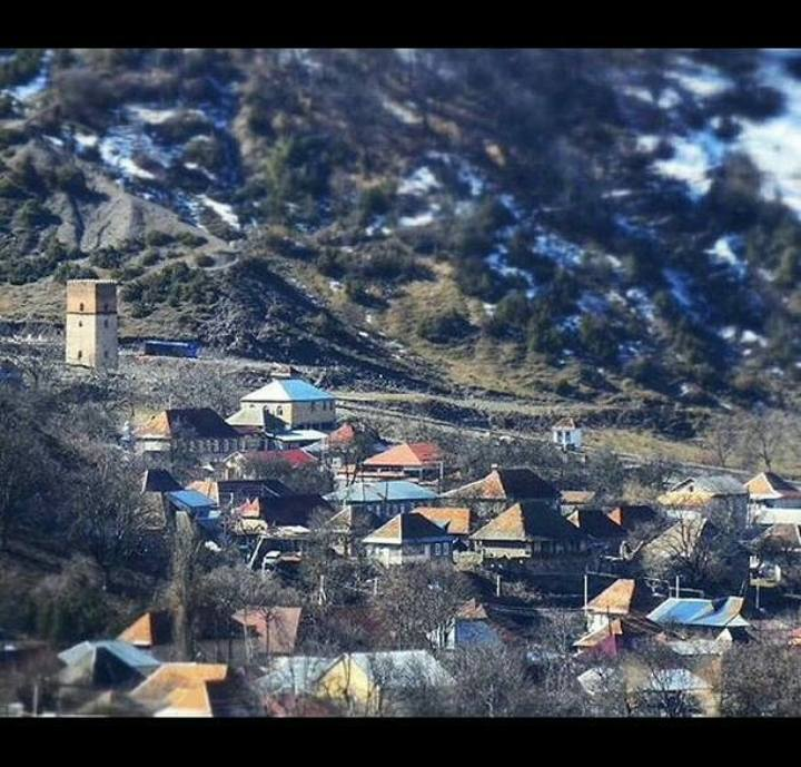 İlisuda məhəllə